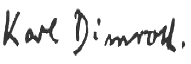 Signatur von Karl Dimroth